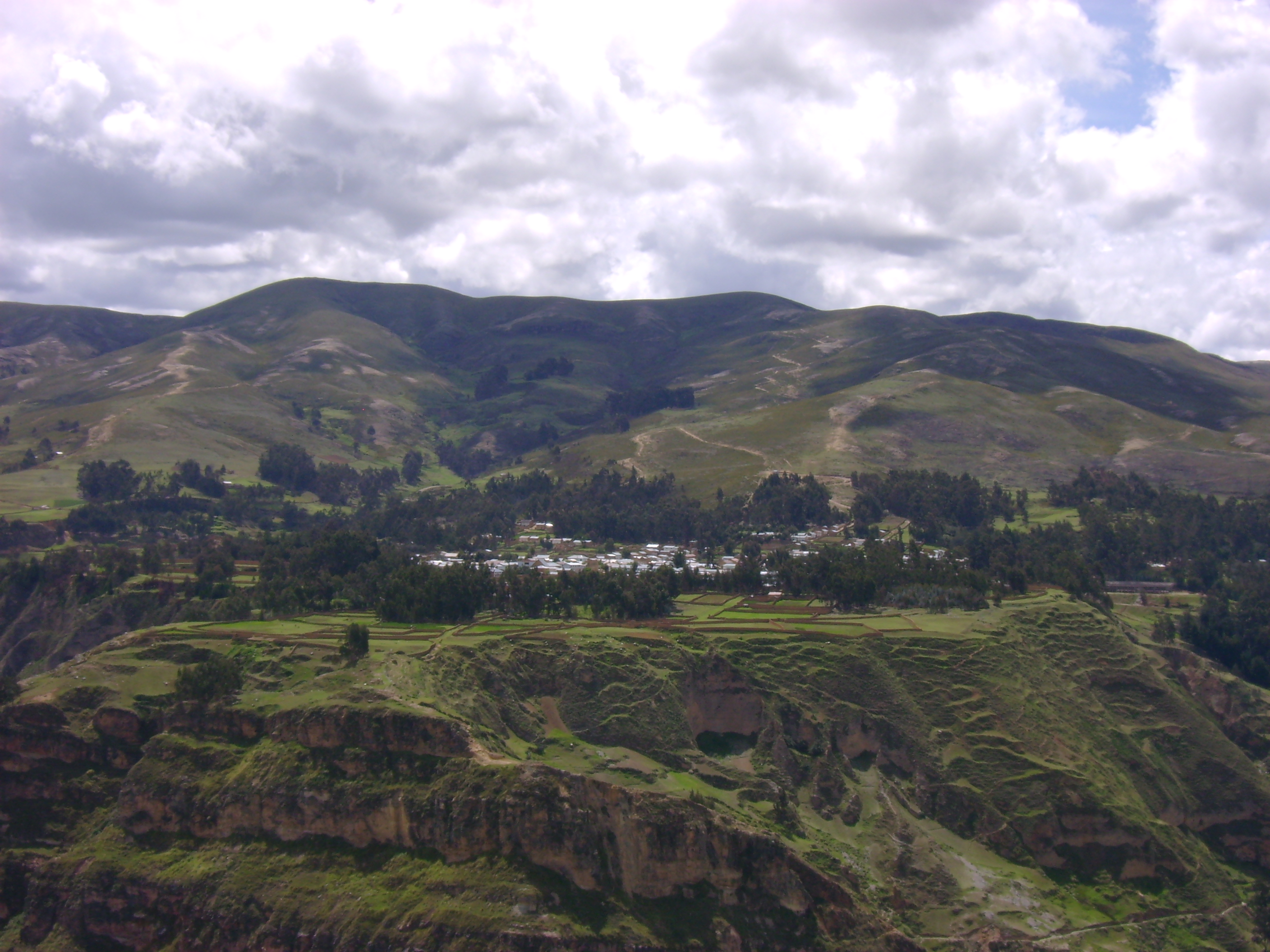 Vista de la enigmatica y legendaria ciudad de Rondos desde la parte alta de Huarín.